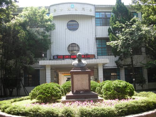 桃園縣龍潭鄉石門國小。